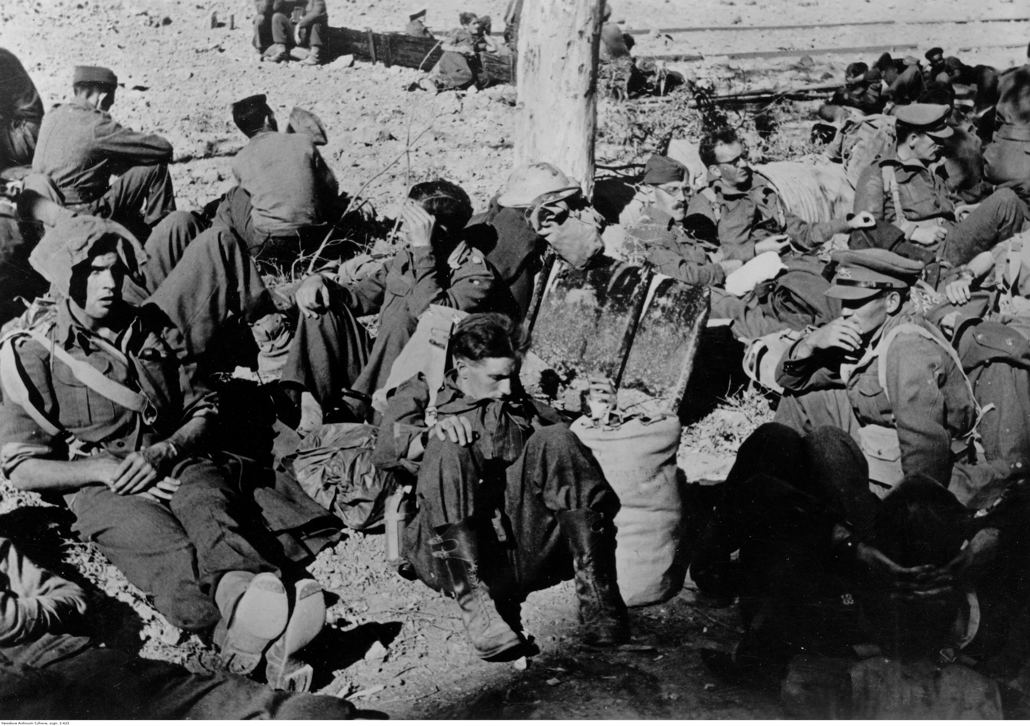 Grupa angielskich jeńców wziętych do niewoli na wyspie Leros podczas odpoczynku.